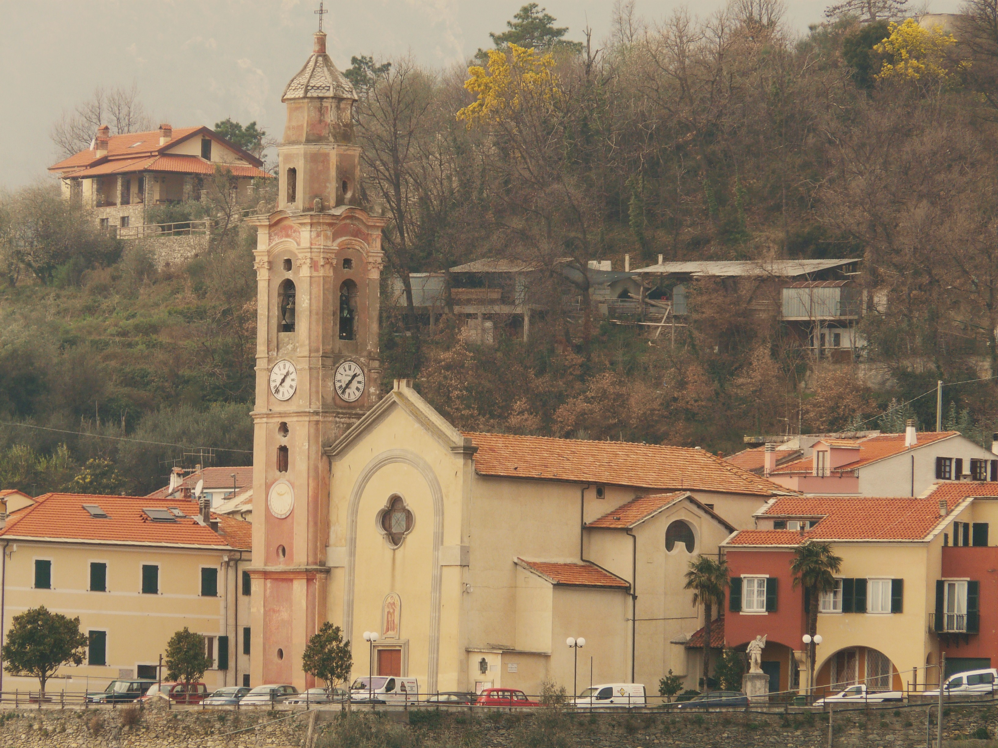 Chiesa di San Sebastiano, Bardino Nuovo, Tovo San Giacomo, Liguria, Italia